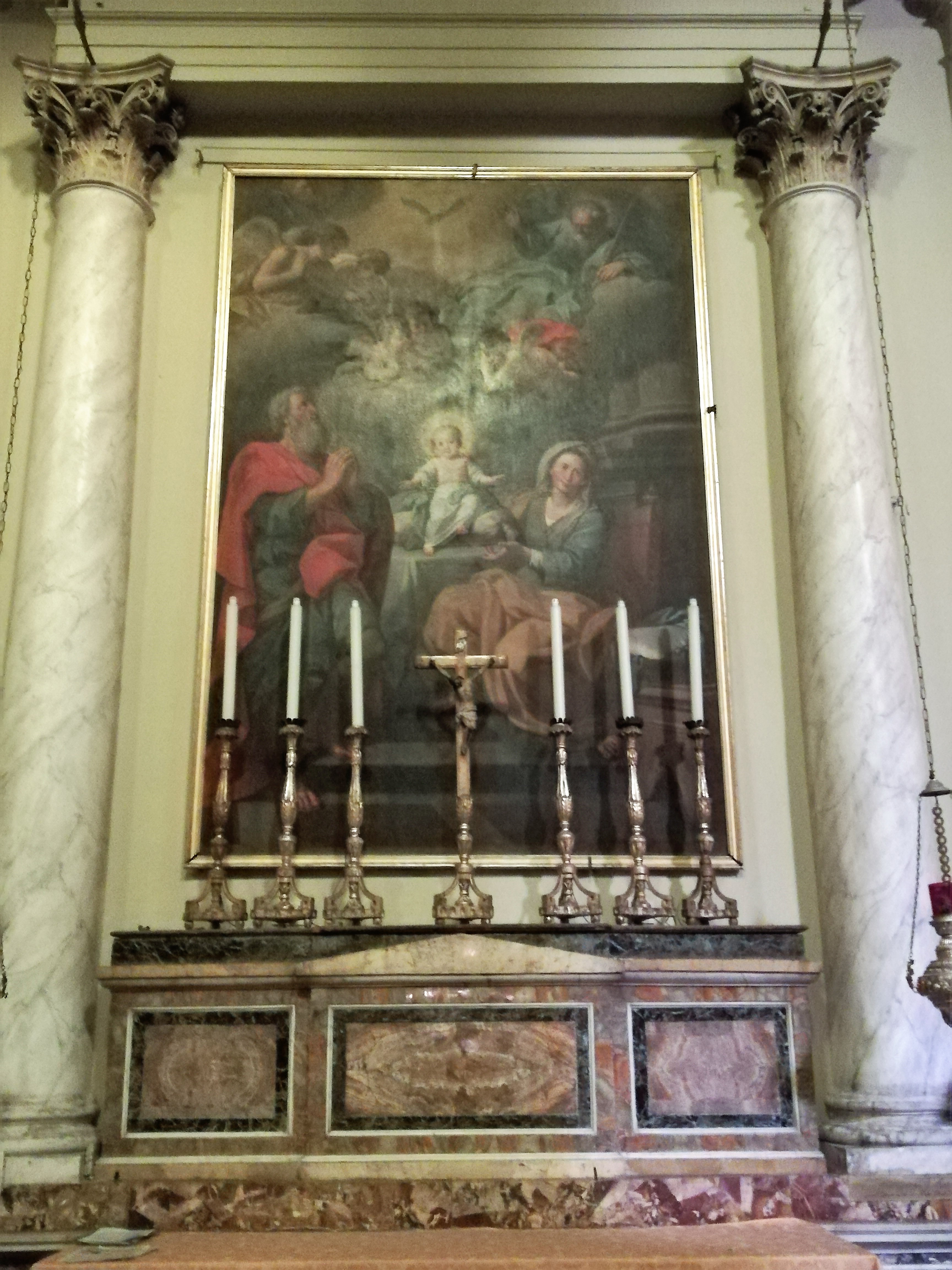 Sant'Anna e Maria Bambina, dipinto di Piero Paolo Vasta, cappella eponima, cattedrale di Acireale.